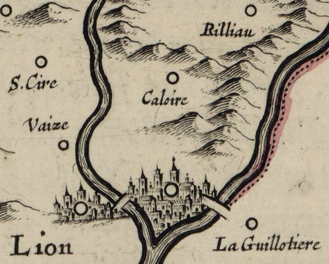 Détail d'une carte de 16xx montrant Caluire sous le nom Caloire.